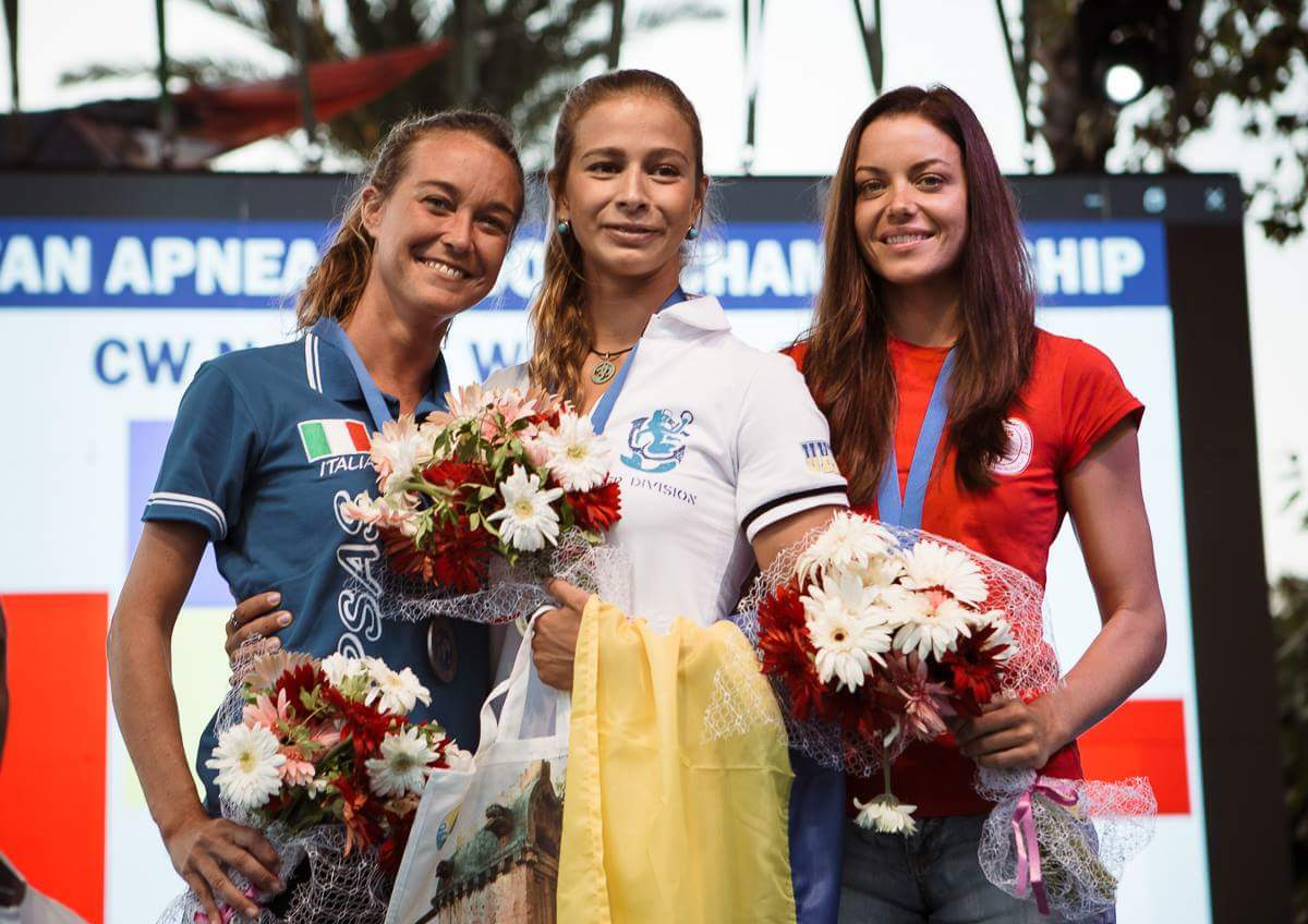 Чемпионат фридайвинг Каш 2017